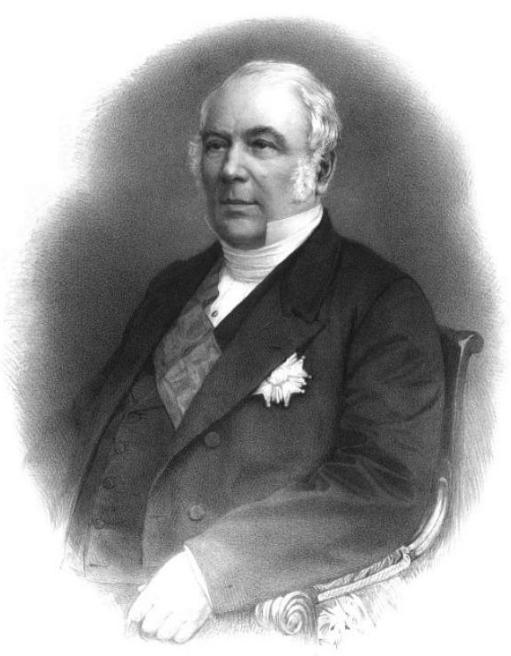 Portrait de Raymond-Théodore Troplong (1795-1869), président du Sénat de 1852 à 1869.